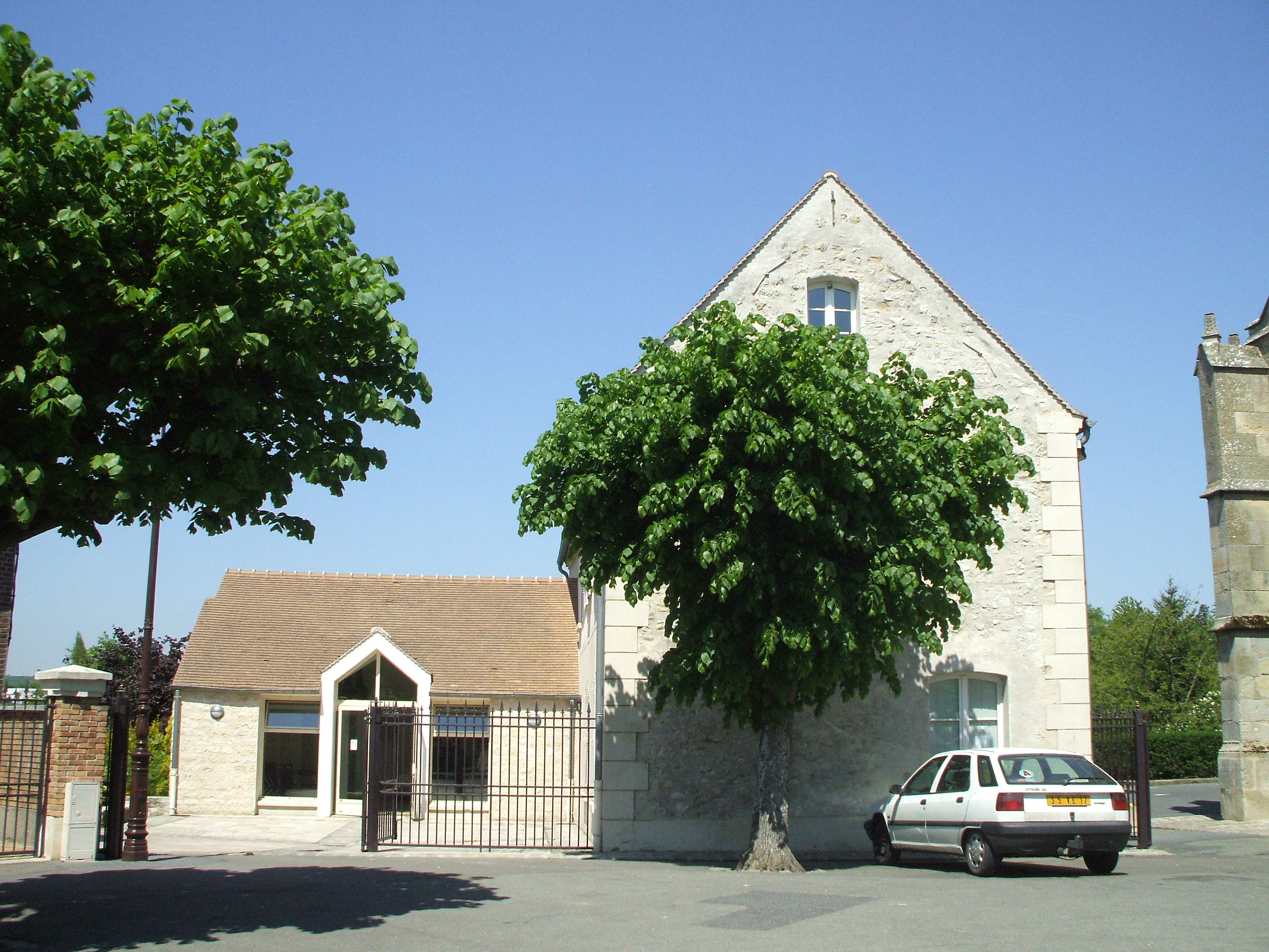 mediatheque de belloy en france val d'oise